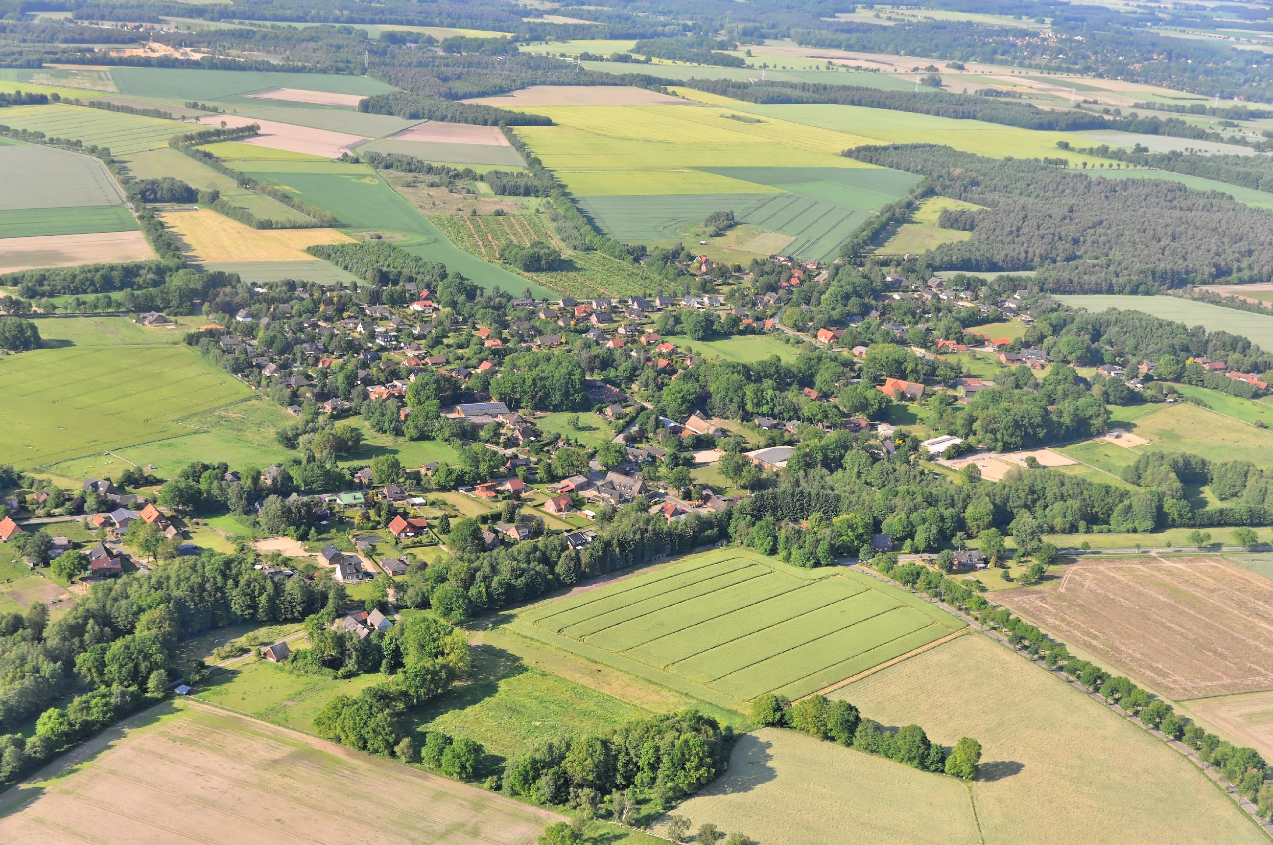 Überführungsflug vom Flugplatz Nordholz-Spieka über Lüneburg, Potsdam zum Flugplatz Schwarzheide-Schipkau